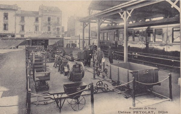 Usines Petolat, Dijon (Exposition de Nancy)